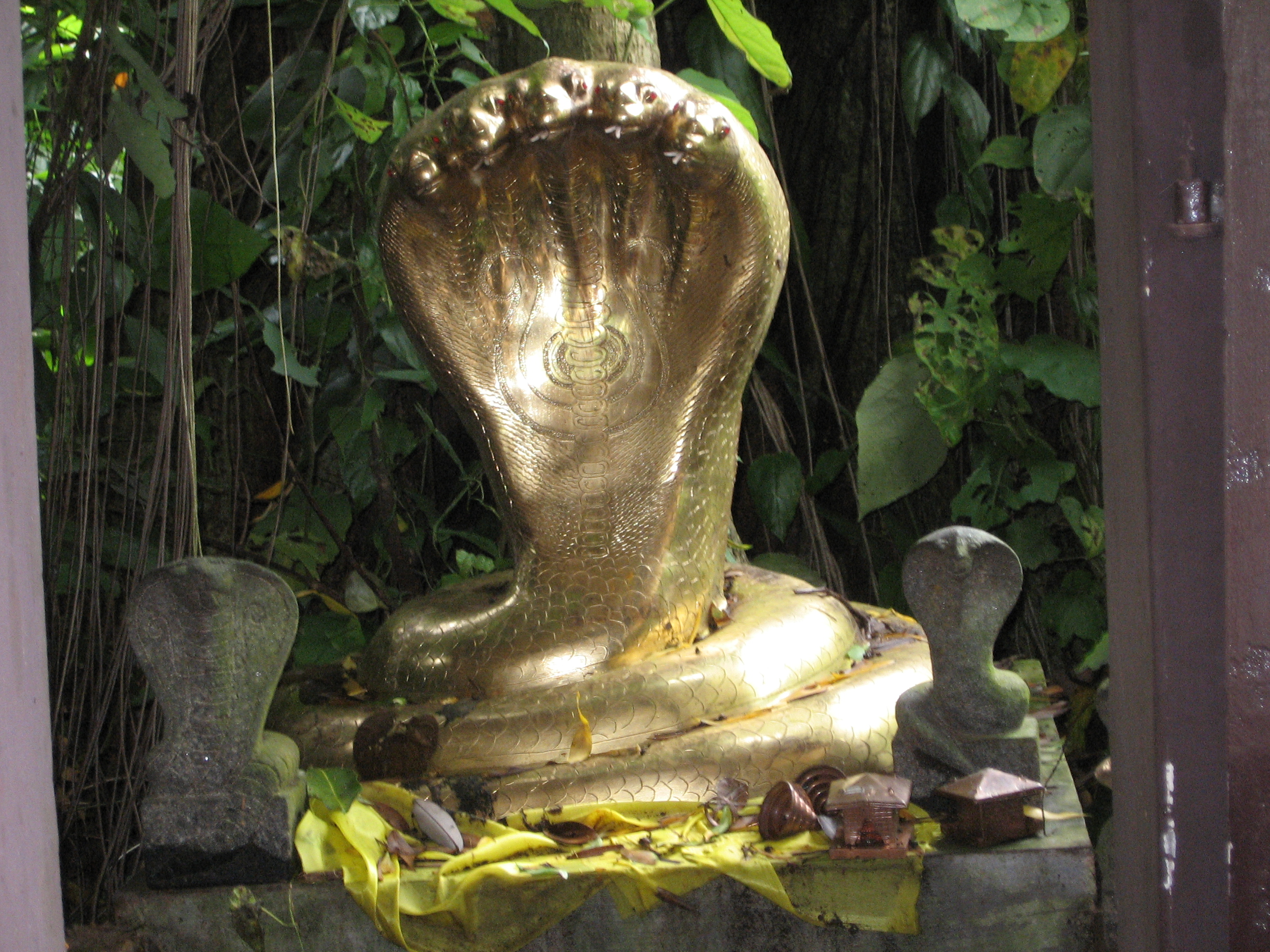 കാവിലെ ഒരു പ്രതിഷ്ട